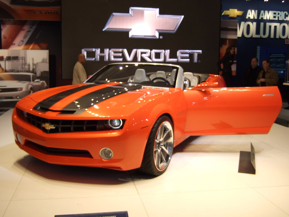 2007 Camaro Convertible Concept